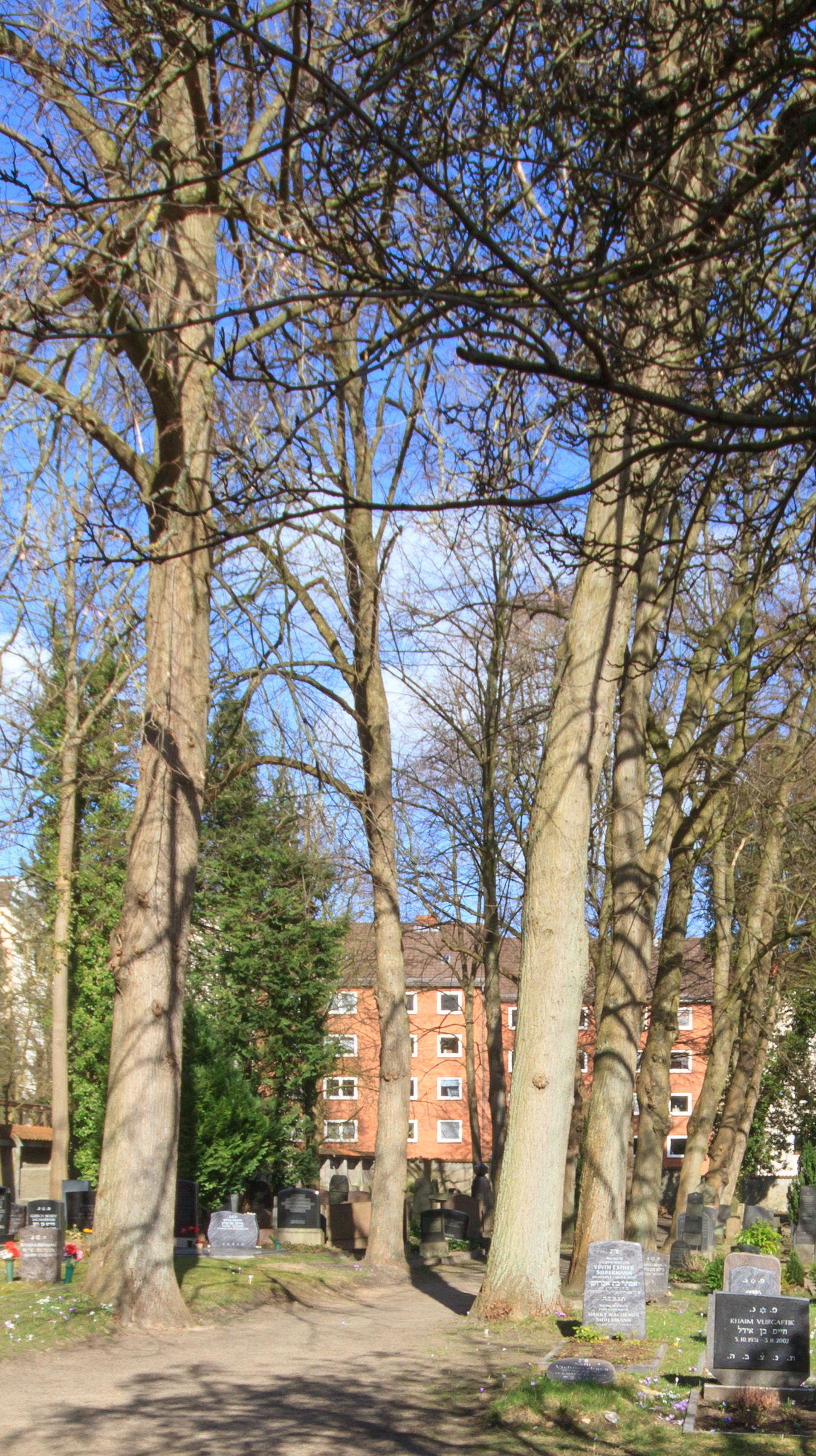 Die Baumallee auf dem Mittelweg des alten jüdischen Friedhofs an der Michelsenstraße in Kiel ließ der damalige Gemeindevorsteher Julius Lask anpflanzen, nachdem er dafür angeblich eine anonyme Spende erhalten habe. Nach seinem Tod kam heraus, dass Lask selbst der Wohltäter war.